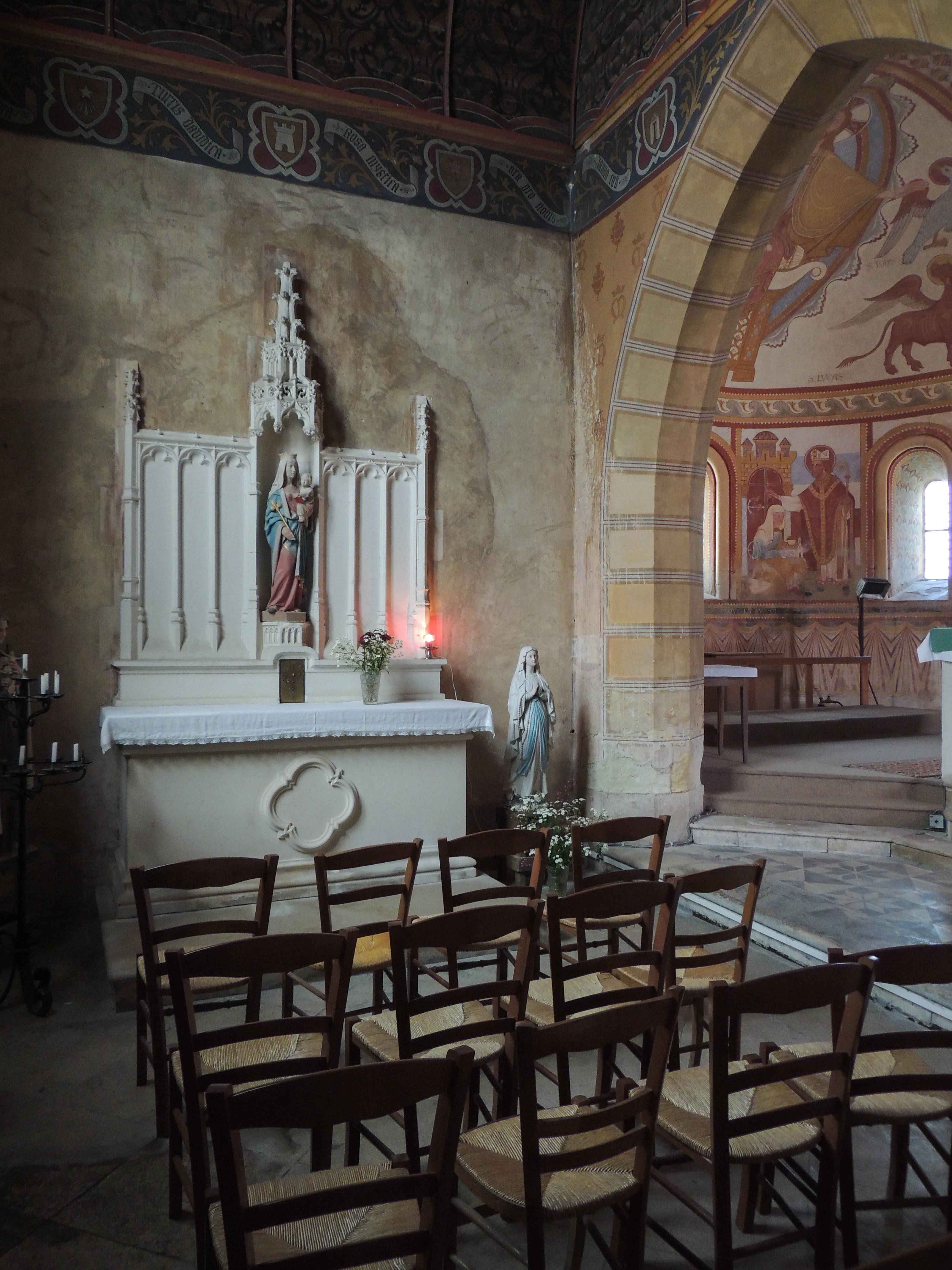 L'église Saint-Julien de Poncé : chapelle du transept gauche.